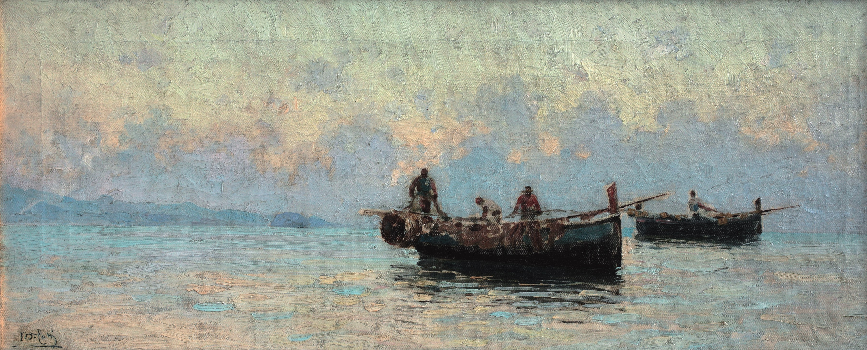 Olio su tela, 30x67cm, coll. privata